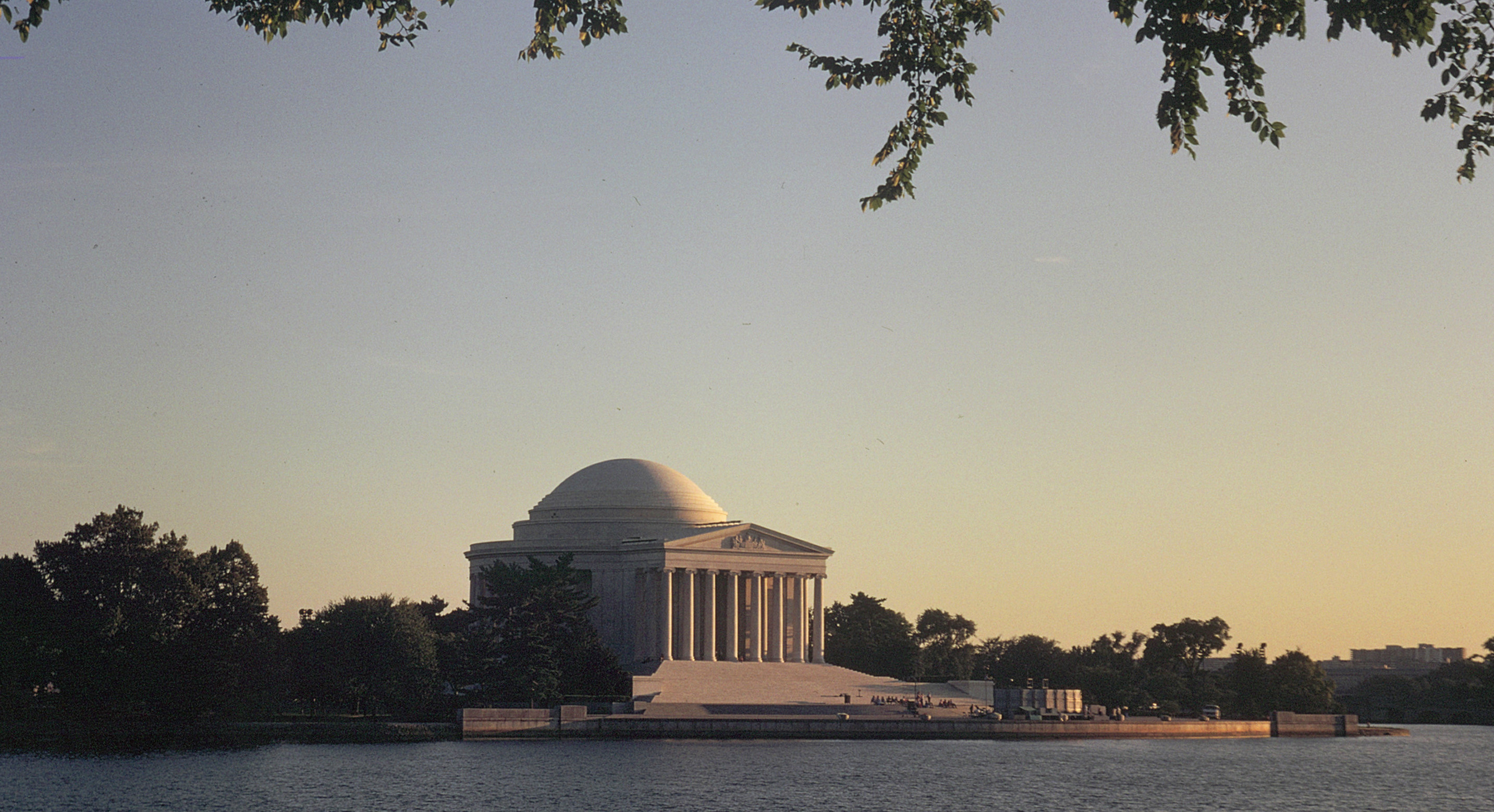 El Thomas Jefferson Memorial en Washington, Estados Unidos.